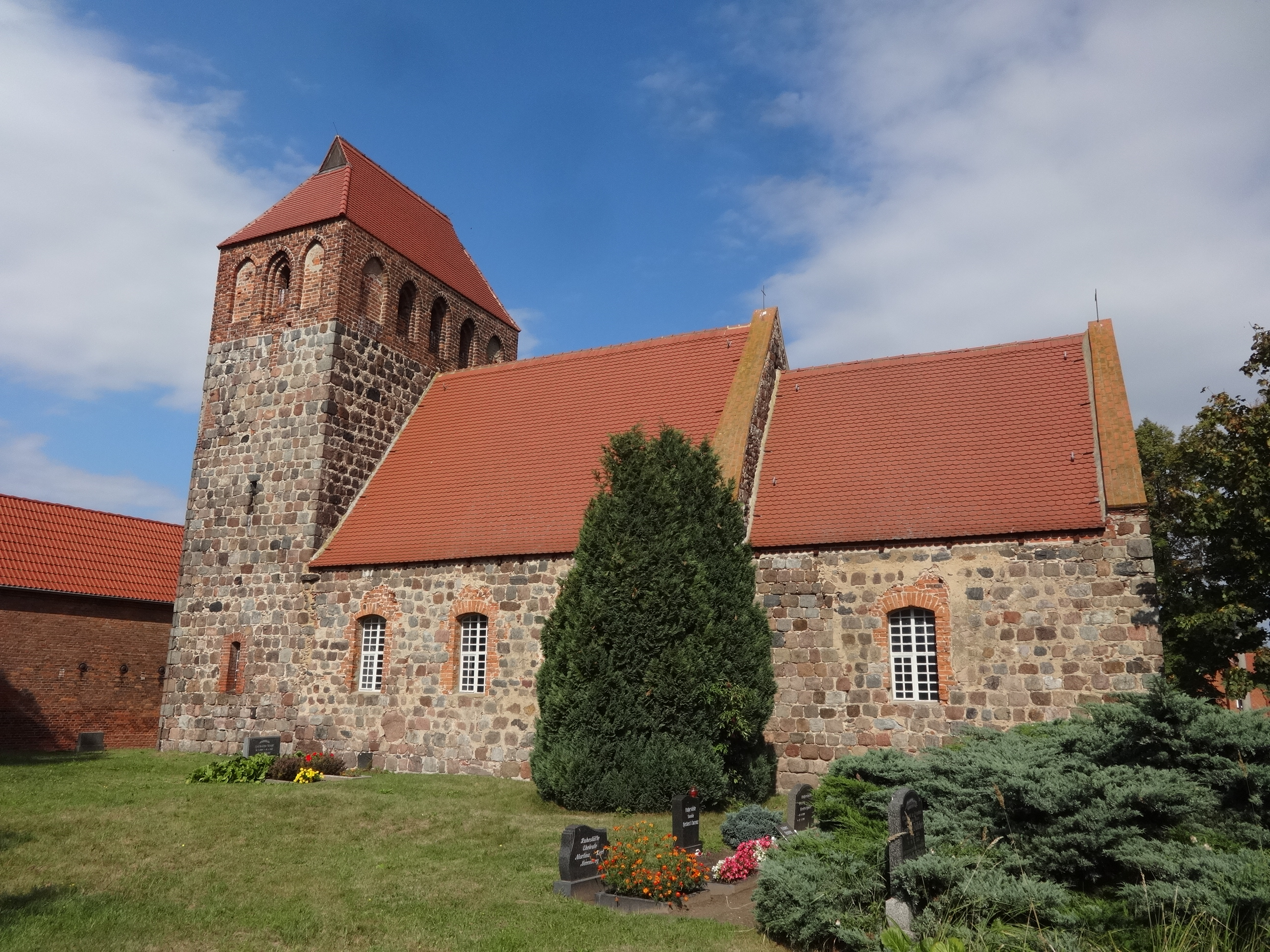 Dorfkirche Werder aus dem 12. Jahrhundert in Werder, Ortsteil von Jüterbog in Brandenburg.